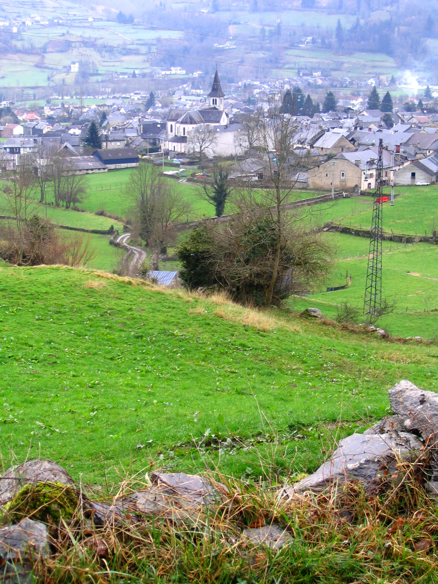 Laruns - Pyrénées Atlantiques - France Vue générale vers le sud-est et la vallée du valentin. Author:P.Charpiat